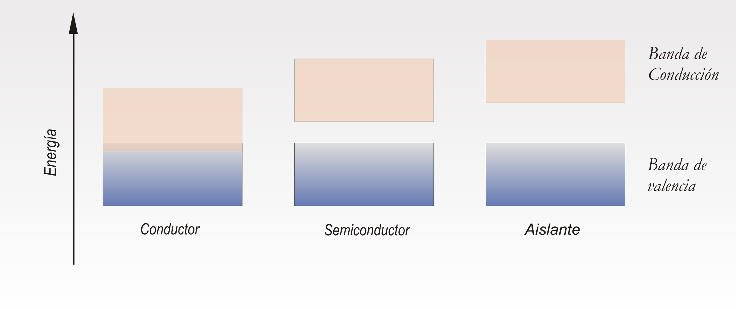 En el esquema se aprecia la diferencia de energías entre las bandas de valencia y de conducción en tres tipos de materiales de distinta conductividad.